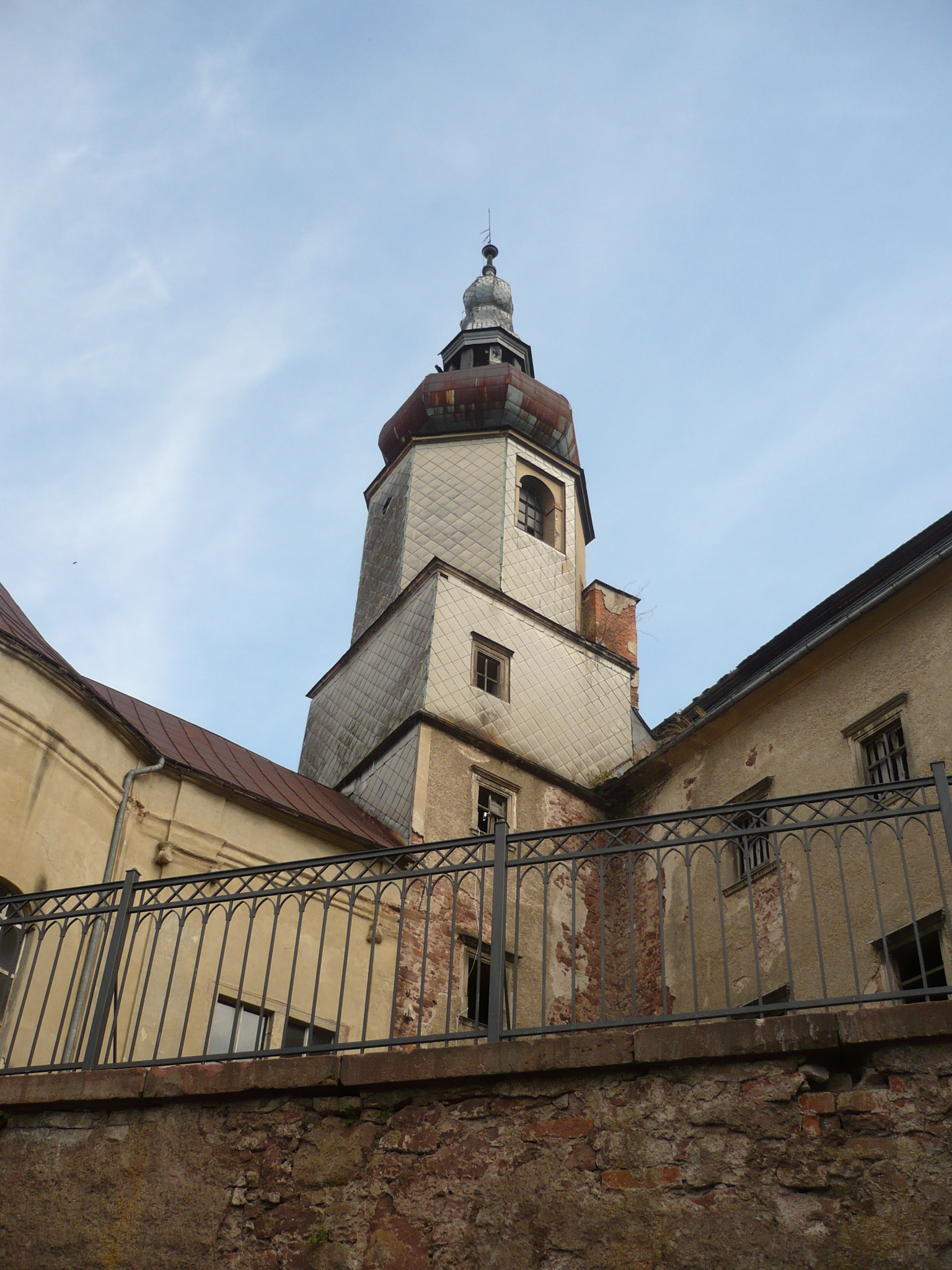 Sarny. Wieża pałacu